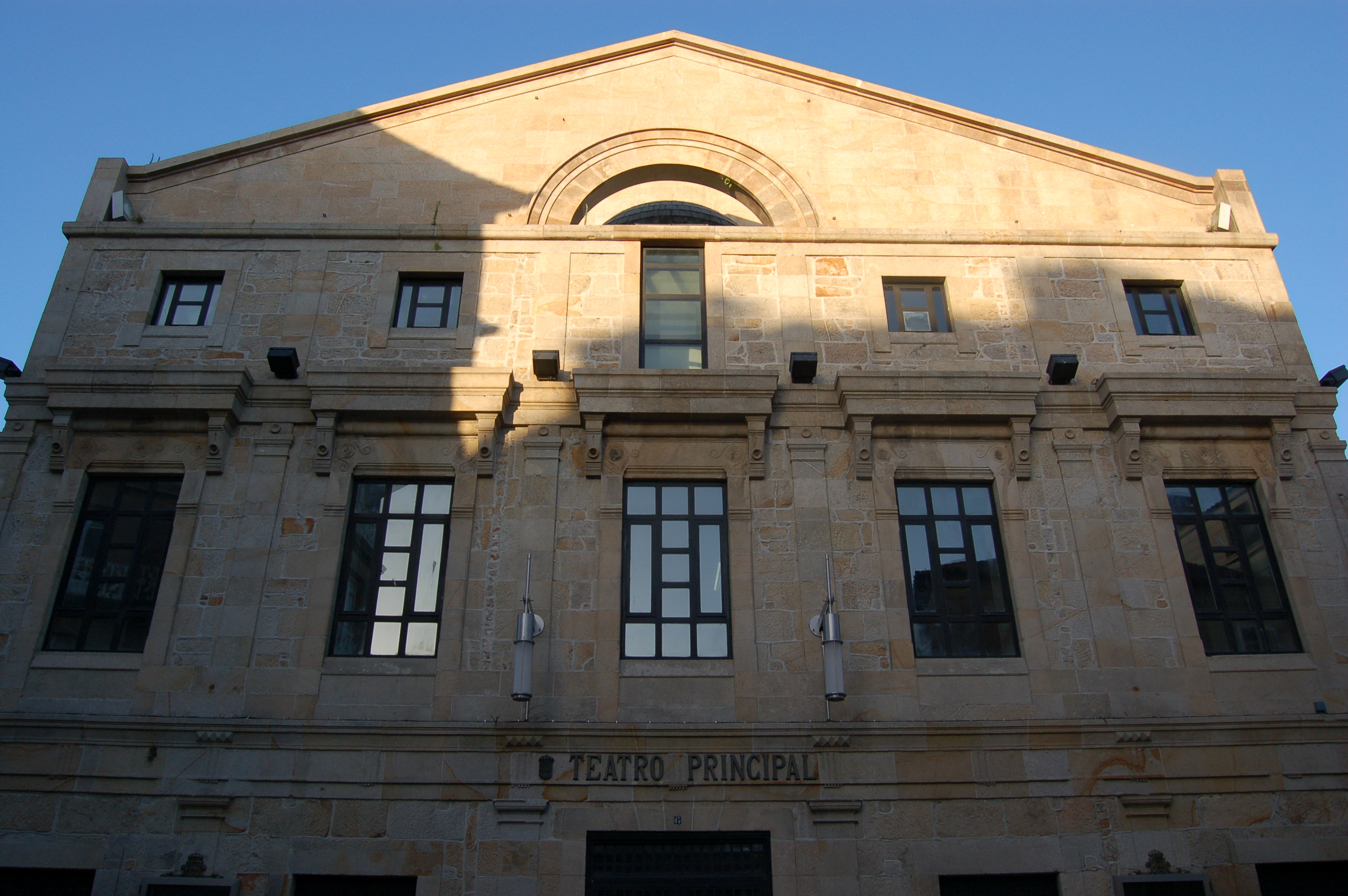 Fachada do Teatro Principal de Pontevedra